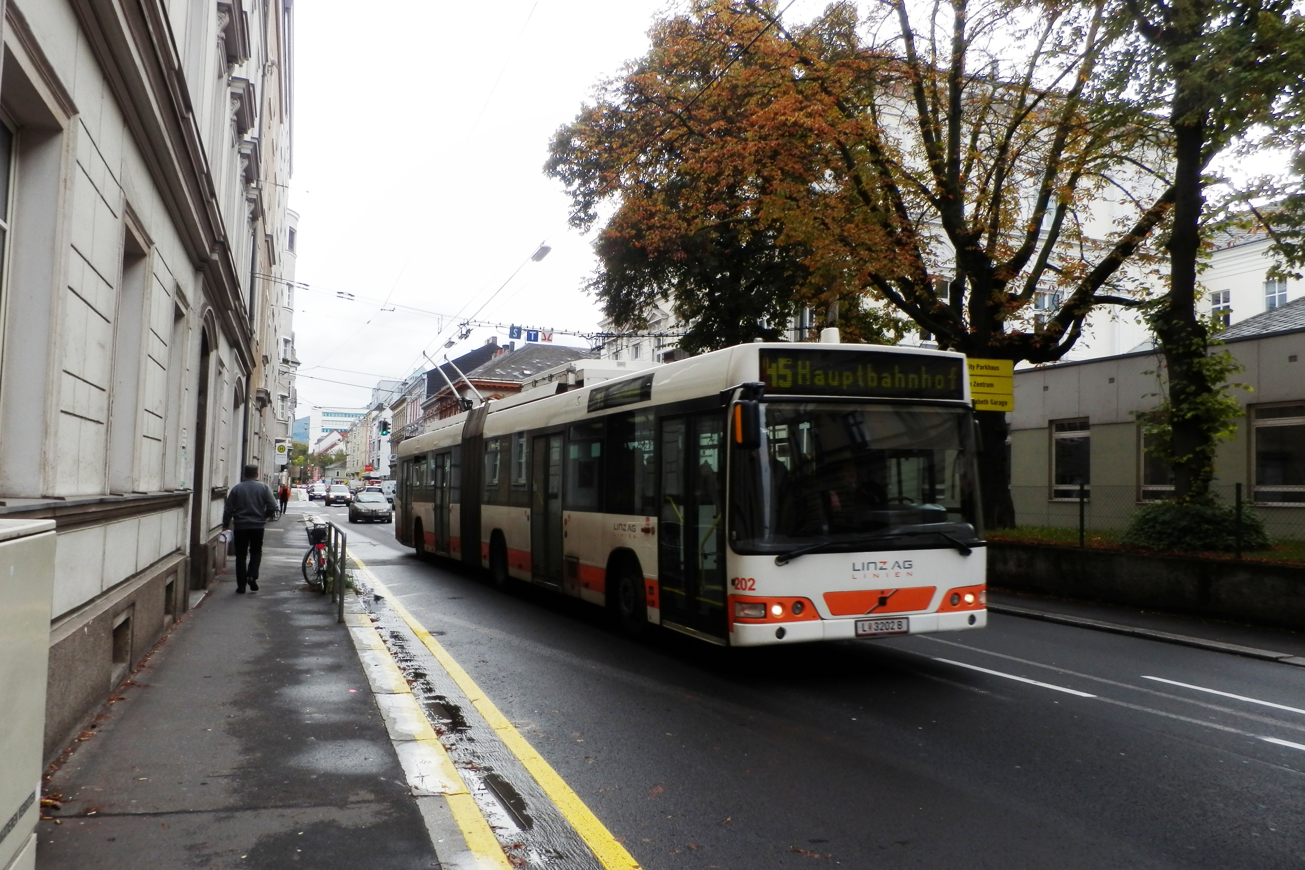 Linz AG Linien Obus auf der Linie 45 Richtung Hauptbahnhof, in der Mozartstraße